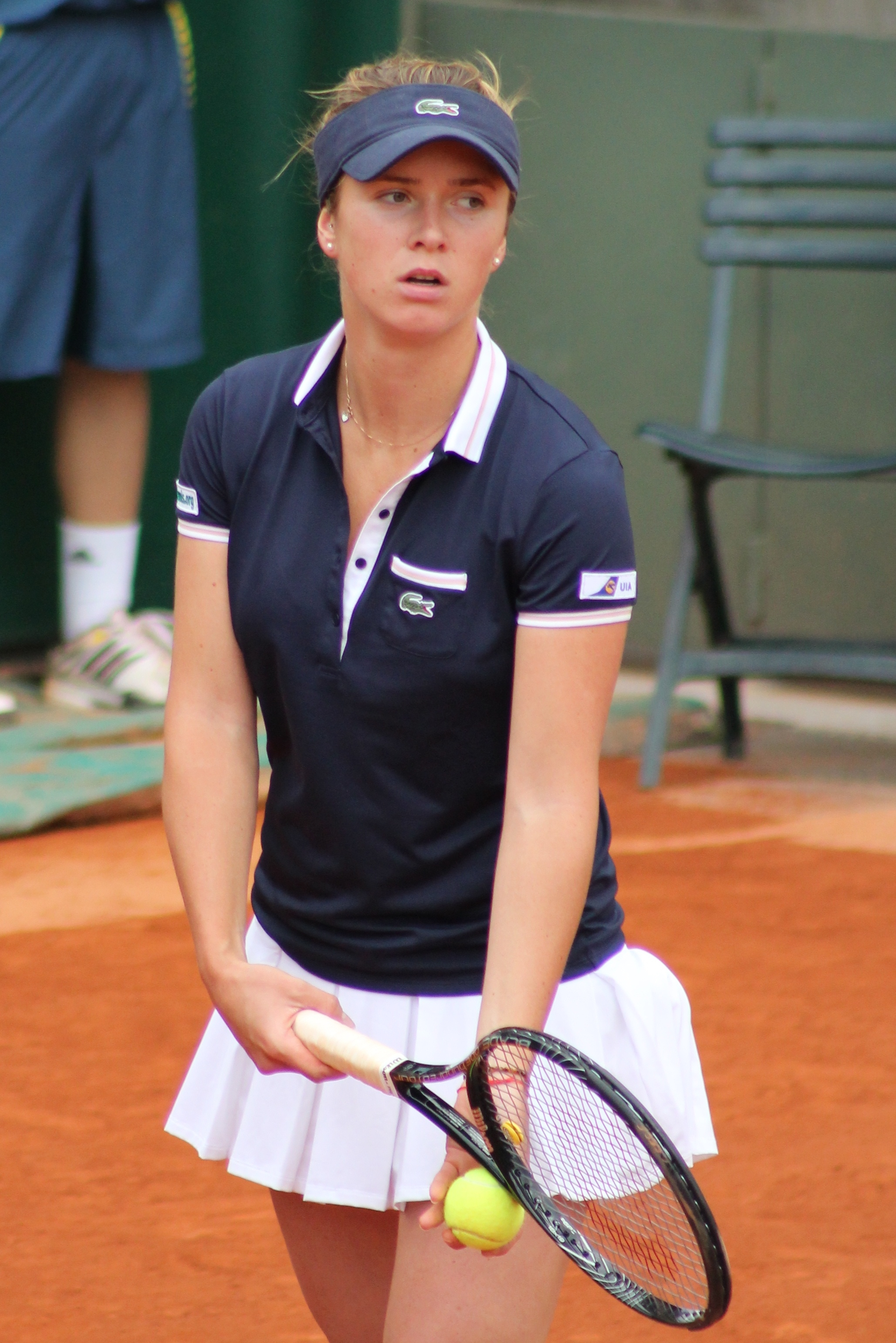 Svitolina RG13 (9)